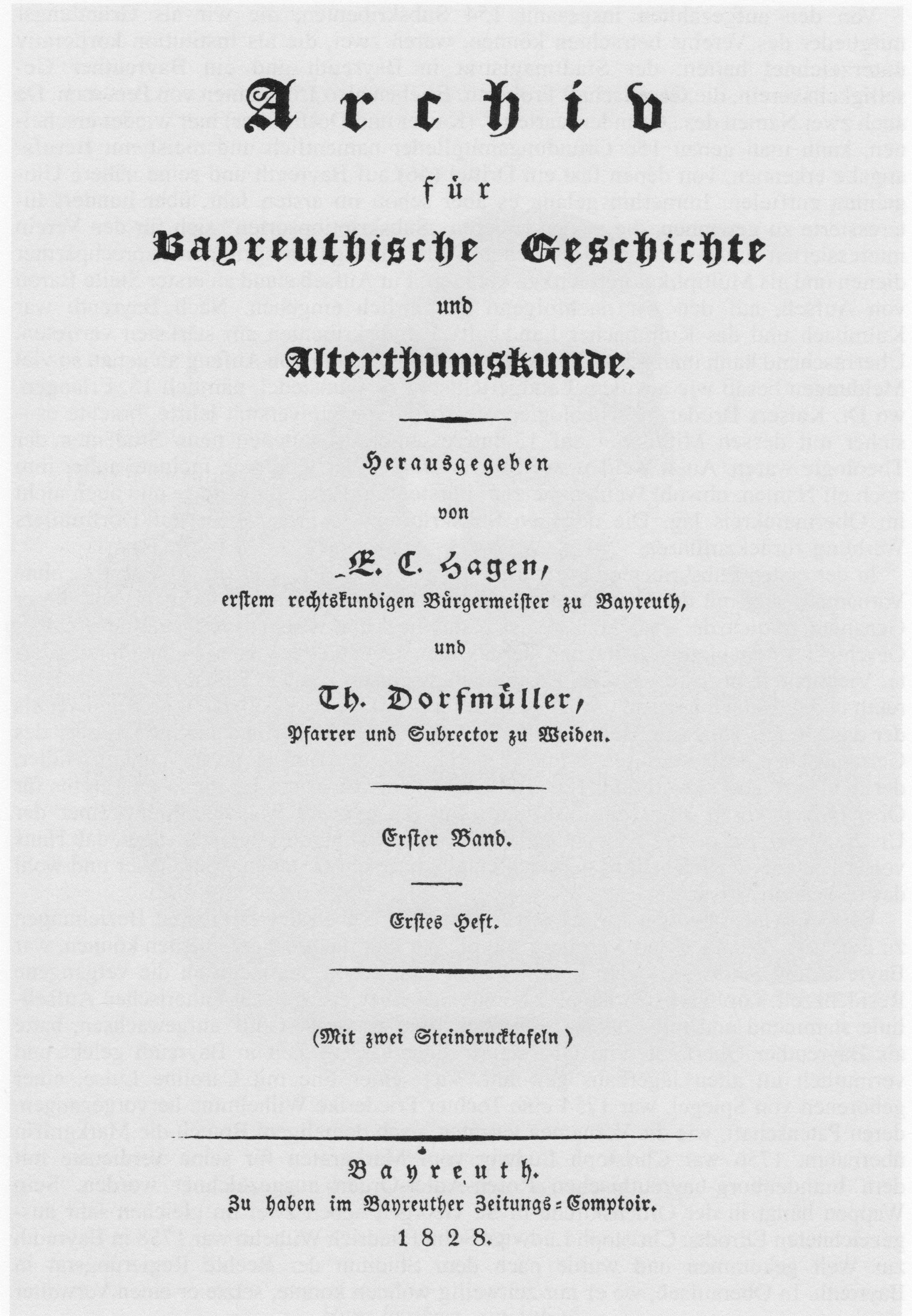 Deckblatt des ersten Bandes der Publikation "Archiv für Geschichte von Oberfranken"